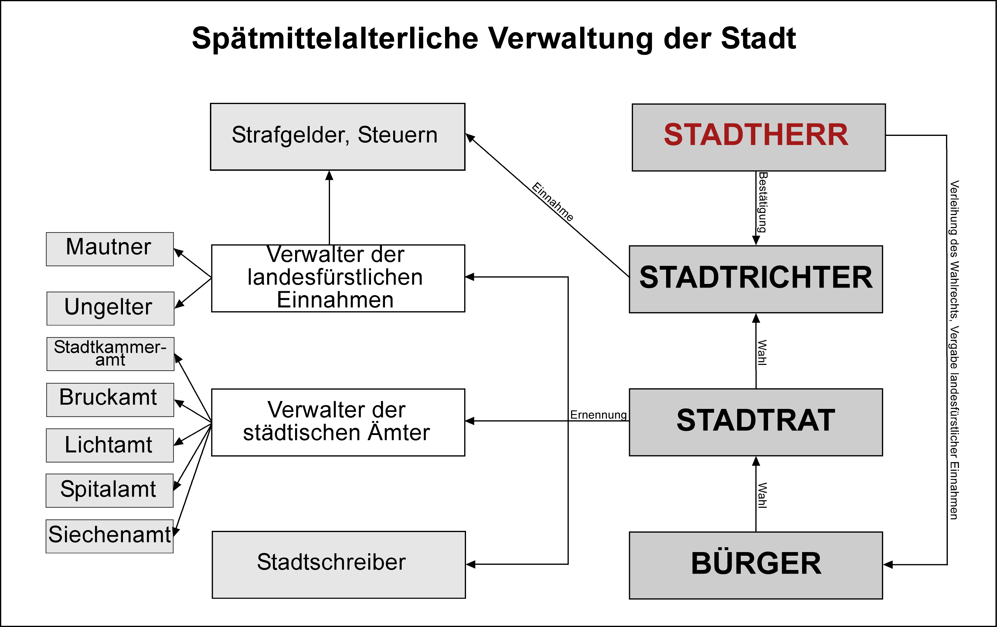 Verwaltung im mittelalterlichen Wels: Die Bürgerschaft wählte die politische Spitze, den Stadtrat. Der Stadtrat wiederum bestimmte den Stadtrichter, der vom Stadtherrn, das heißt dem Landesfürsten, bestätigt werden musste. Das Stadtgericht kontrollierte die Einhebung von Strafgeldern und Abgaben auf Bürgerhäuser und -grundstücke. Der Stadtrichter konnte die Todesstrafe verhängen. Der Stadtschreiber verwaltete die städtischen Ämter und die Einnahmen aus der Maut sowie die Ausgaben der Stadt. Der Stadtrat ernannte den Stadtschreiber. Das Stadtkammeramt musste die städtischen Bauwerke wie die Befestigungsanlagen und das Rathaus instandhalten sowie Jahrmärkte ausrichten und die städtischen Bediensteten bezahlen. Der Bruckmeister war für den Bereich der Traunbrücke und ihre Reparatur verantwortlich. Der Lichtmeister war bei der Stadtpfarrkirche angestellt und überwachte die Tätigkeit des Pfarrers und das Vermögen der Kirche. Der Spitalmeister war der oberste Angestellte des Welser Spitals. Der Siechenmeister betreute das finanzielle Vermögen des Siechenhauses, das eine Art Quarantäne-Einrichtung für Menschen mit ansteckenden Krankheiten war. Der Mautner erhob die Maut, wenn bestimmte Grenzen mit Waren überschritten wurden. Der Ungelter erhob das „Ungeld“, also die Getränkesteuer, auf Bier, Most und Wein, die nur Bürger ausschenken durften, später auch eingeschränkt von den Zünften.